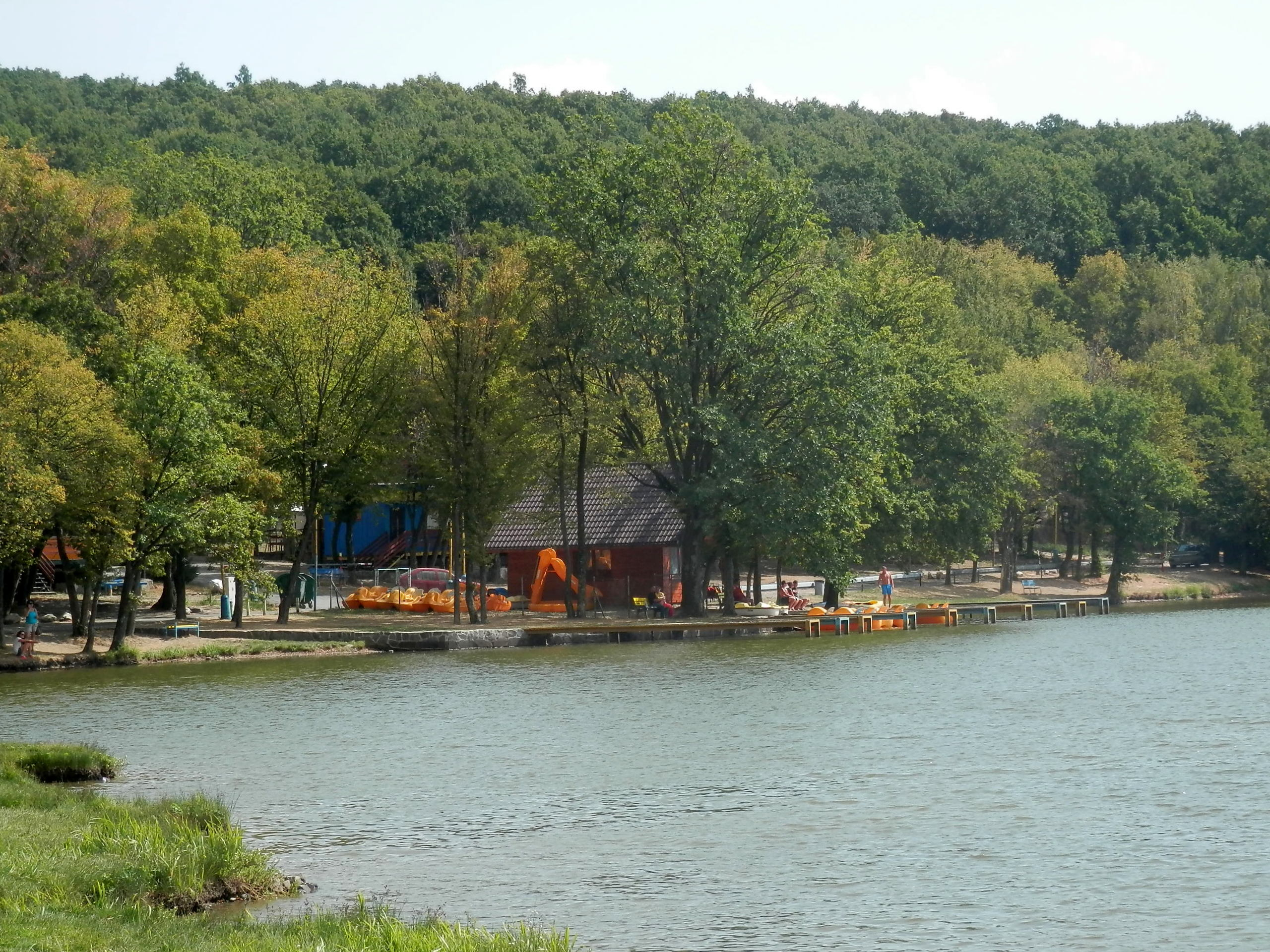 jazero nad obcou Vinné, okres Michalovce.